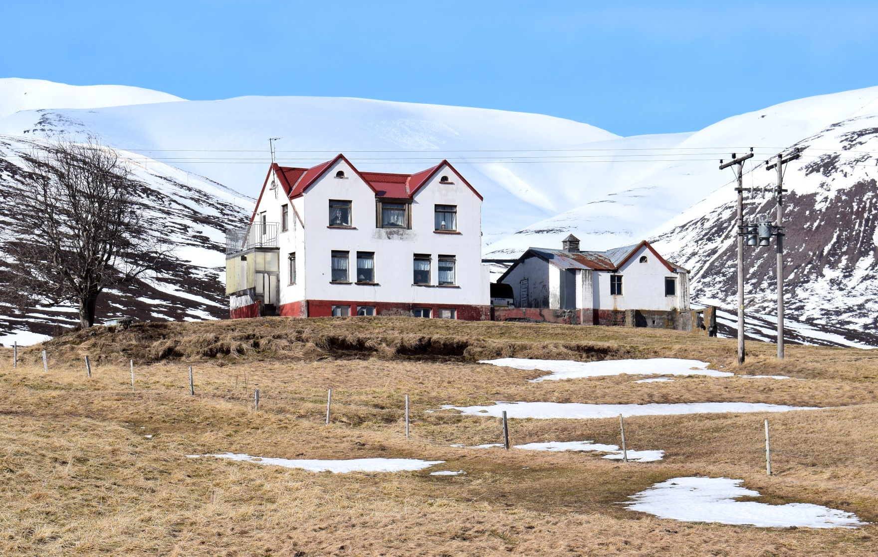 Hrappsstaðir í Svarfaðardal